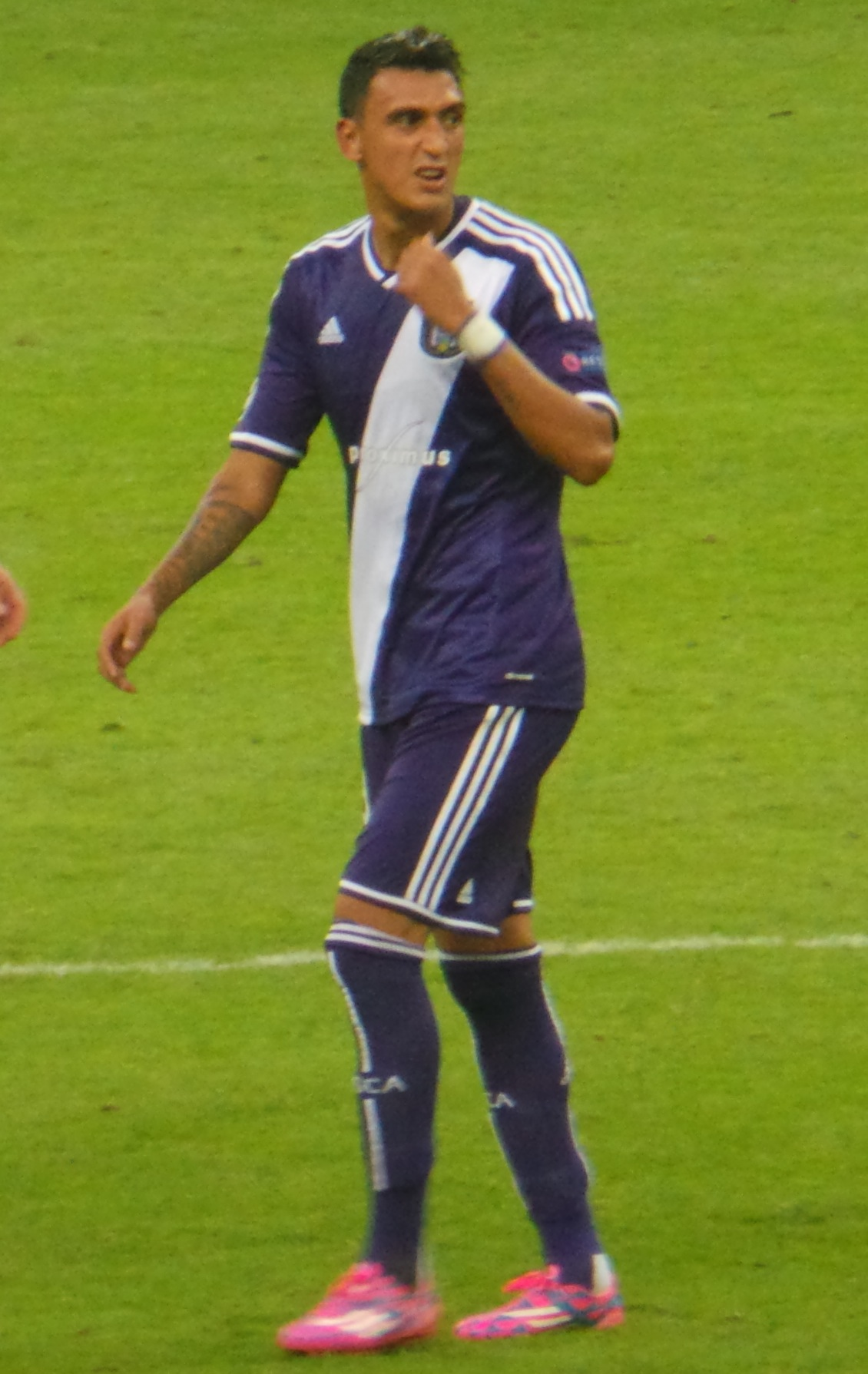 Matías Suárez